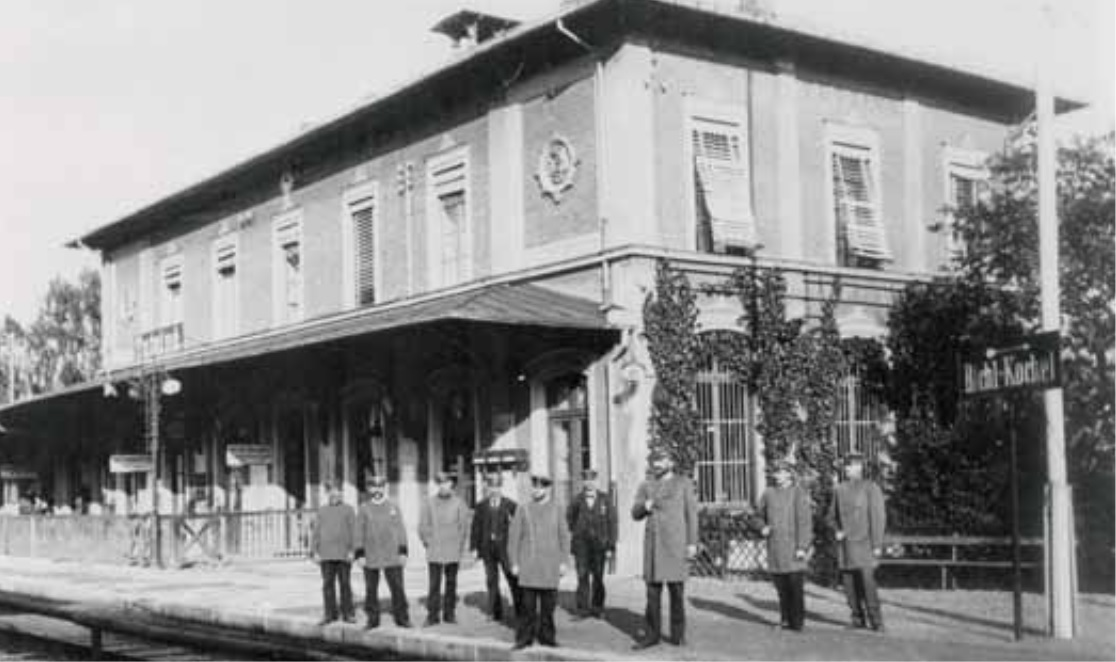 Empfangsgebäude des Bahnhofs Tutzing mit versammeltem Bahnpersonal